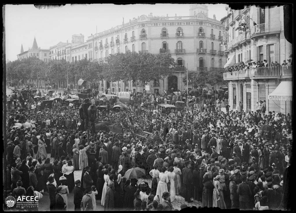 Imatge